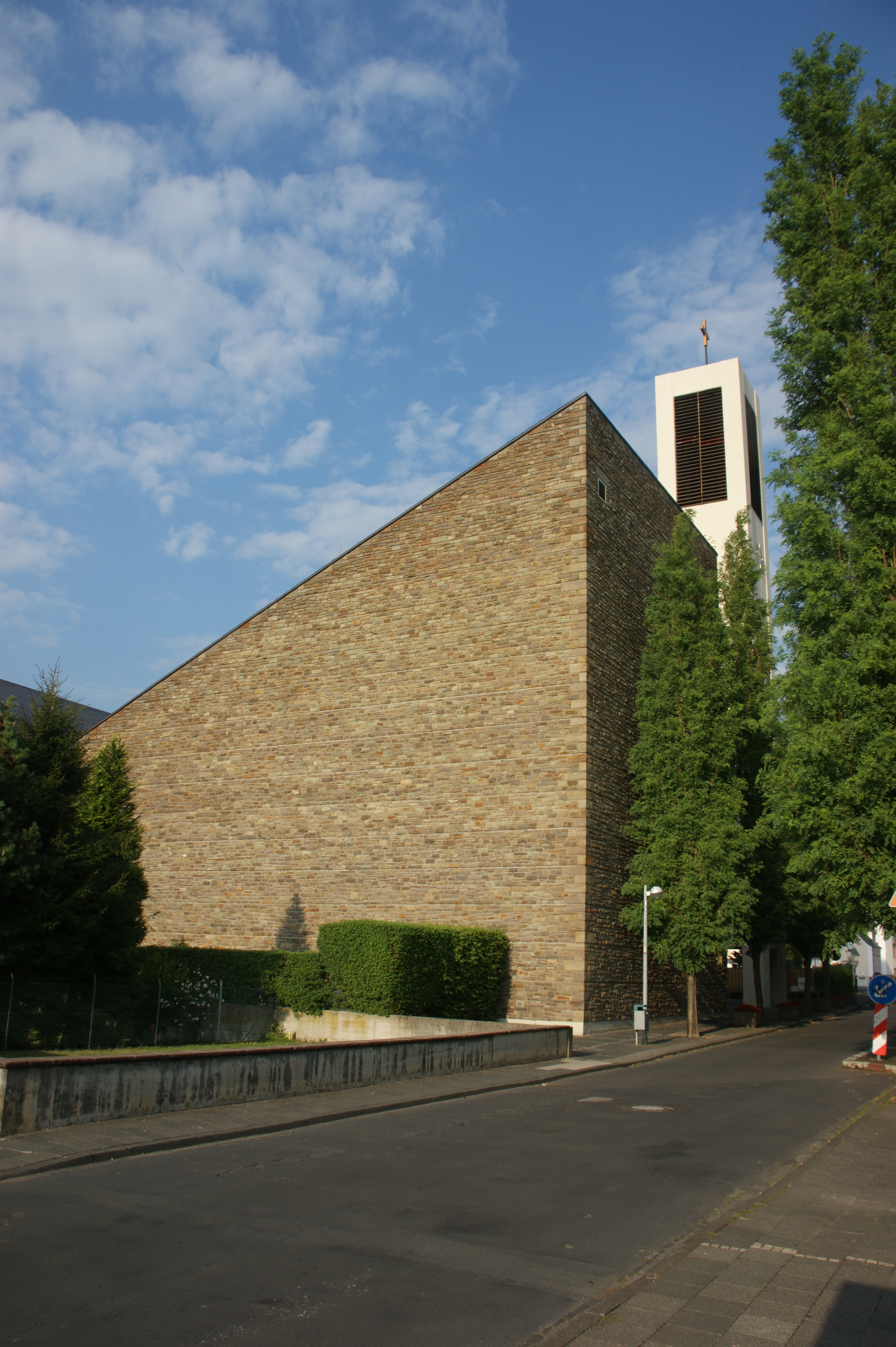 St. Martin in Selhof, Bad Honnef